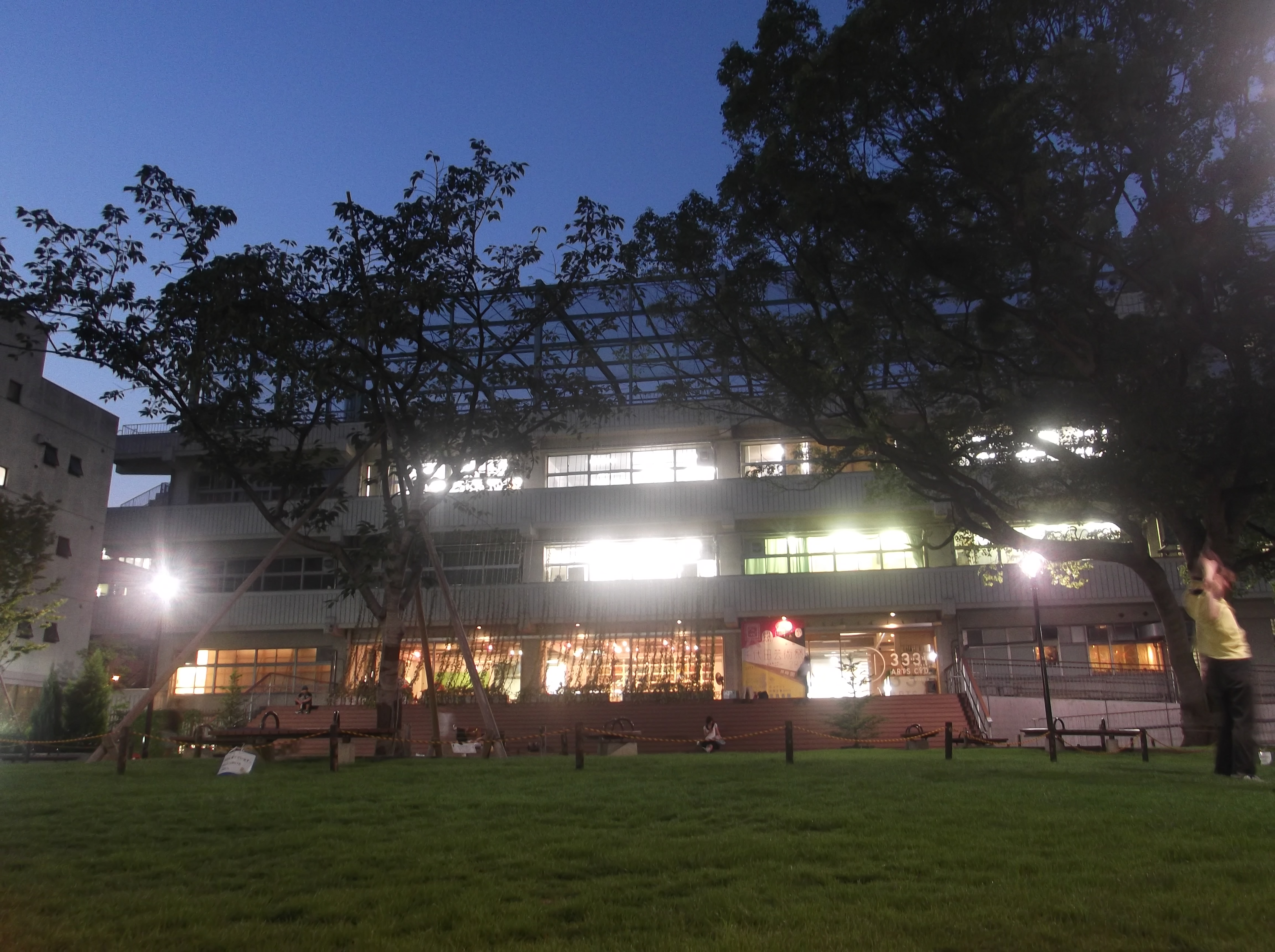 千代田アーツ３３３１建物外観